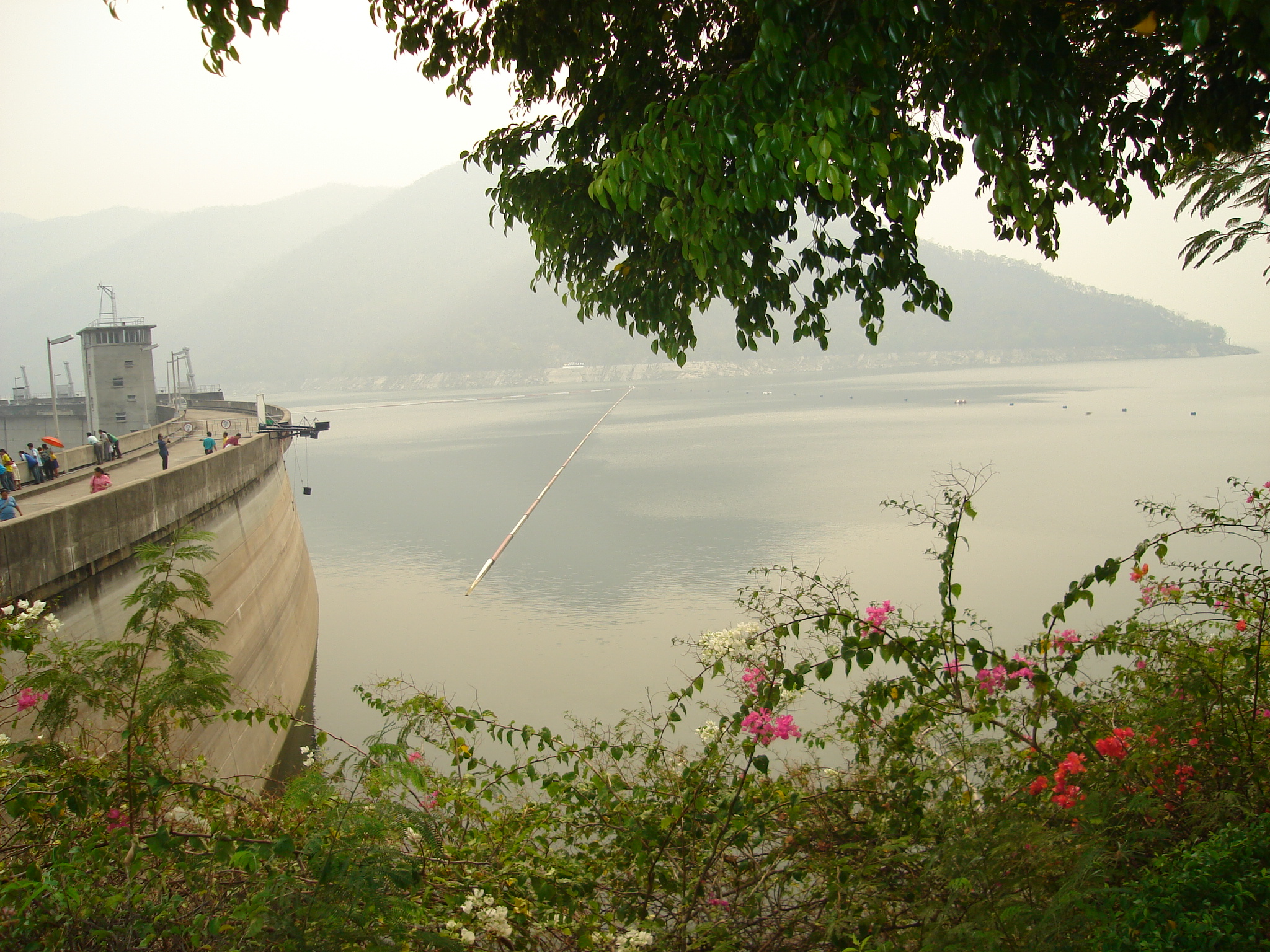 Bhumibol dam